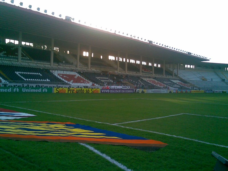 Parte das cadeiras sociais de São Januário